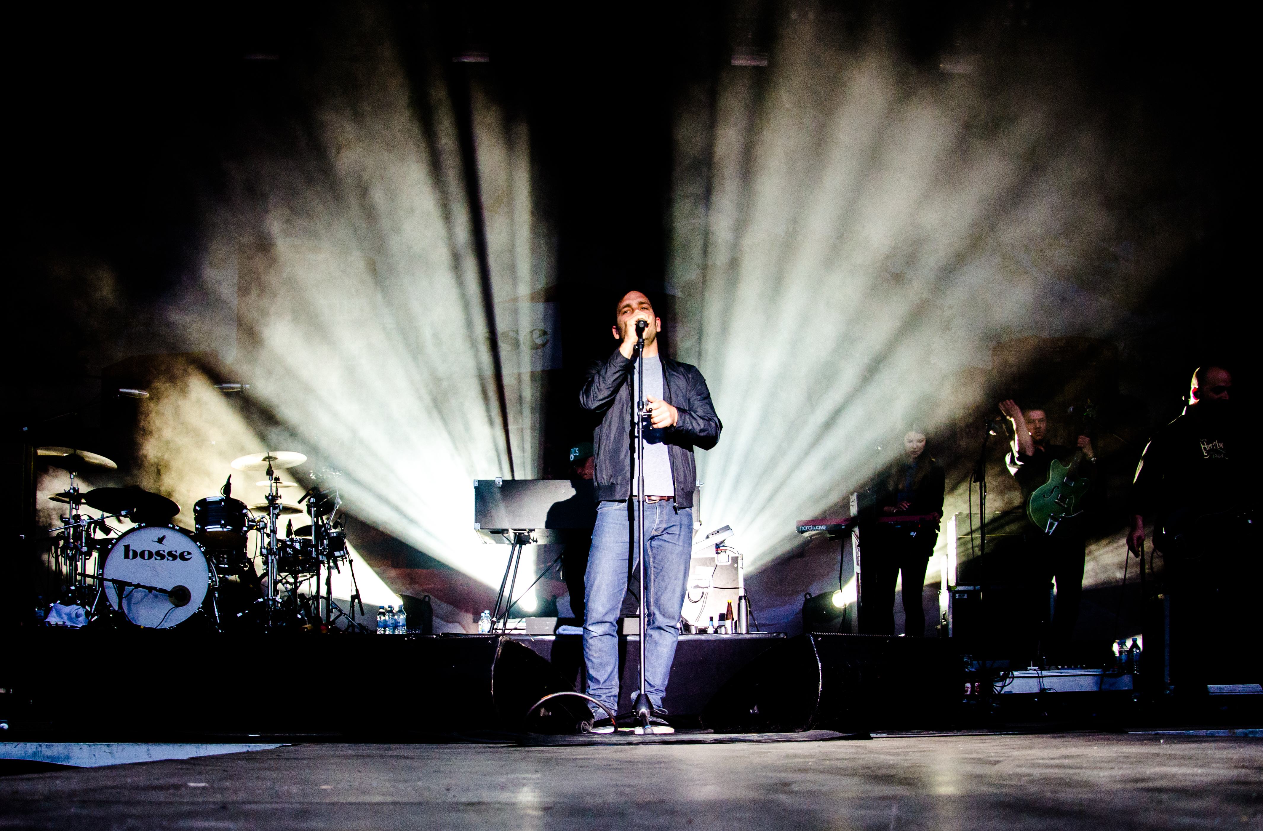 Axel Bosse, Sänger bei Bosse auf dem Kosmonaut Festival 2014 in Chemnitz Oberrabenstein.